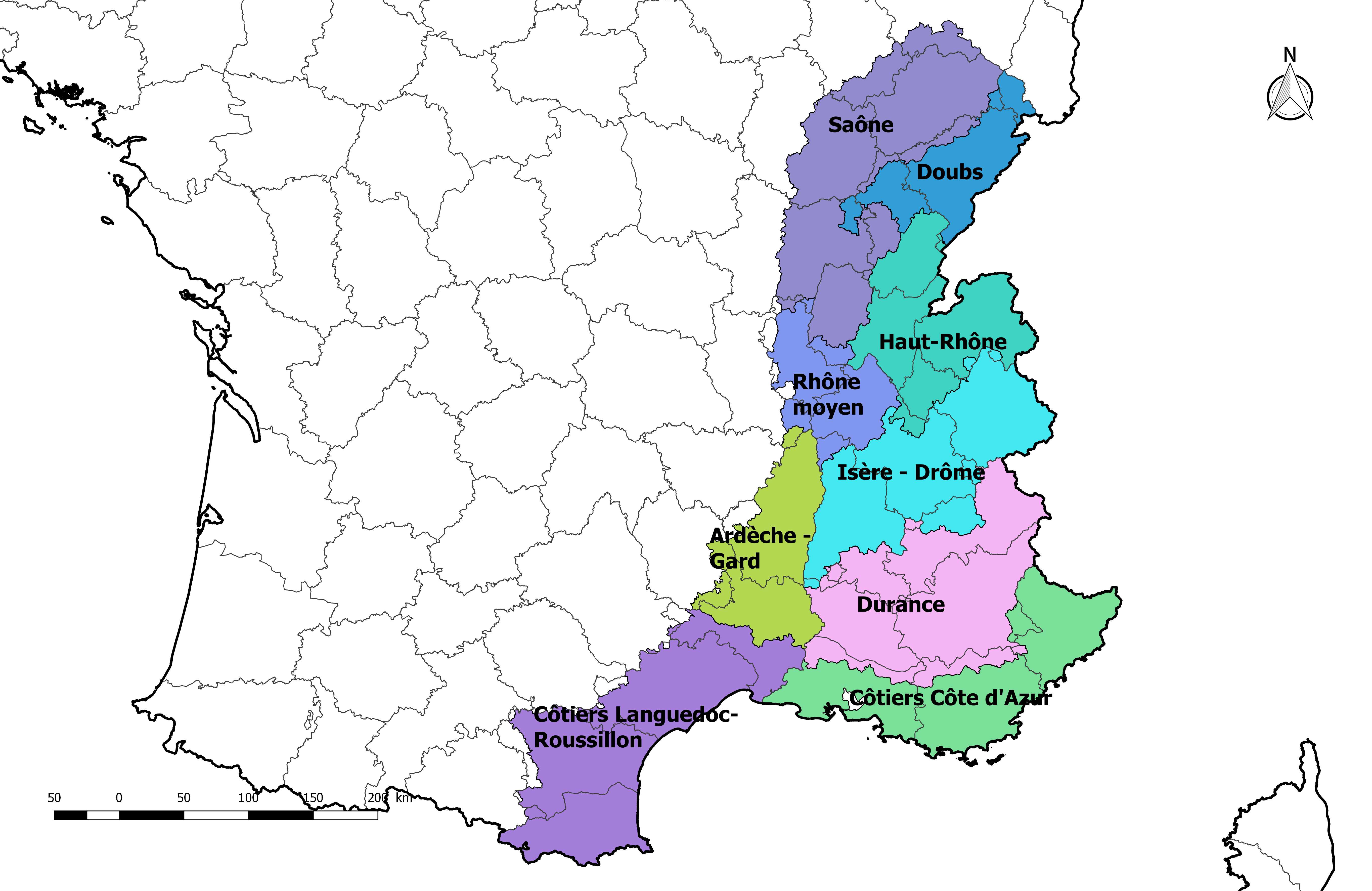 Carte de la circonscription de bassin Rhône-Méditerranée en France, avec les sous-bassins qui la composent.